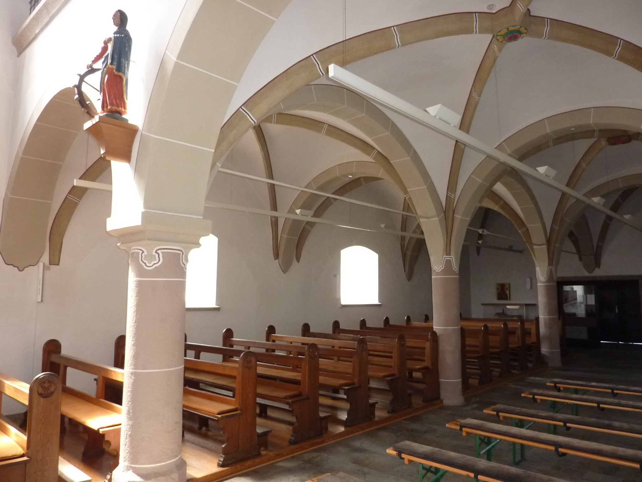 St. Katharina (St. Katharinen-Hilkerscheid)